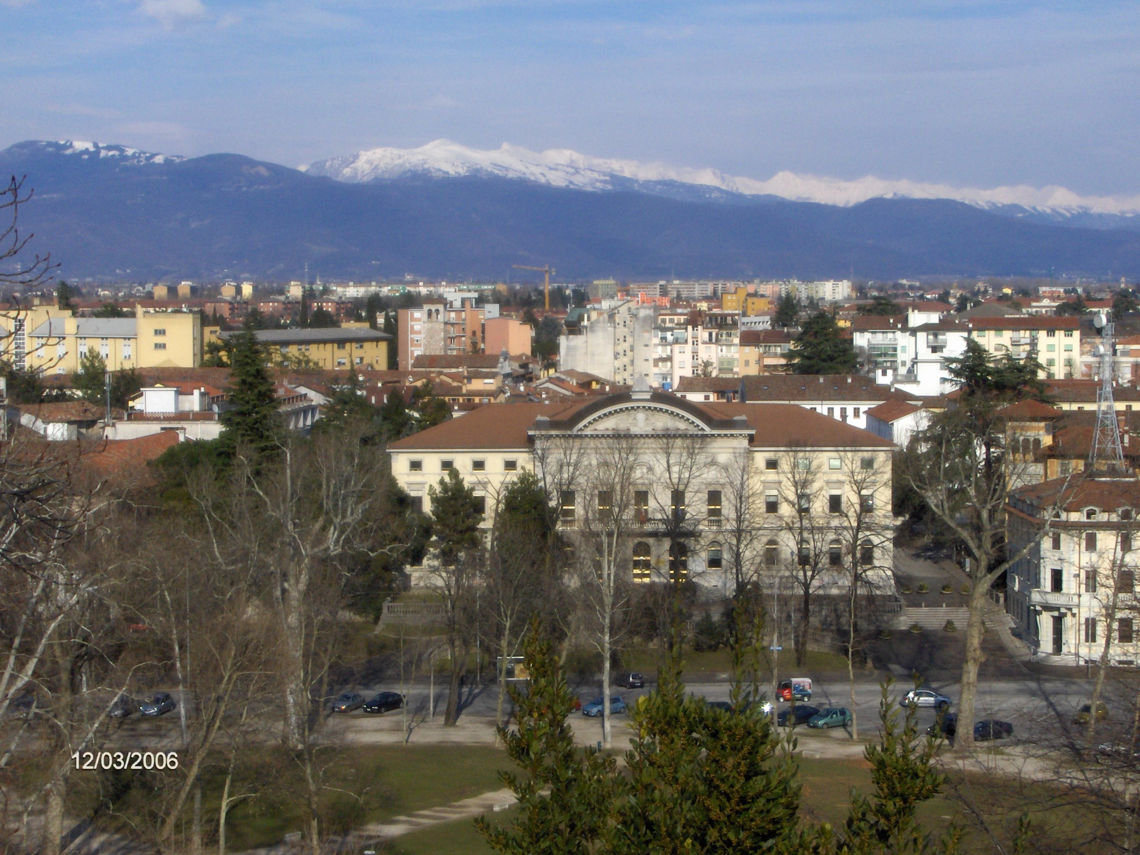 Udine - panorama dal Castello, vista su Piazza I Maggio ed il Liceo Stellini.